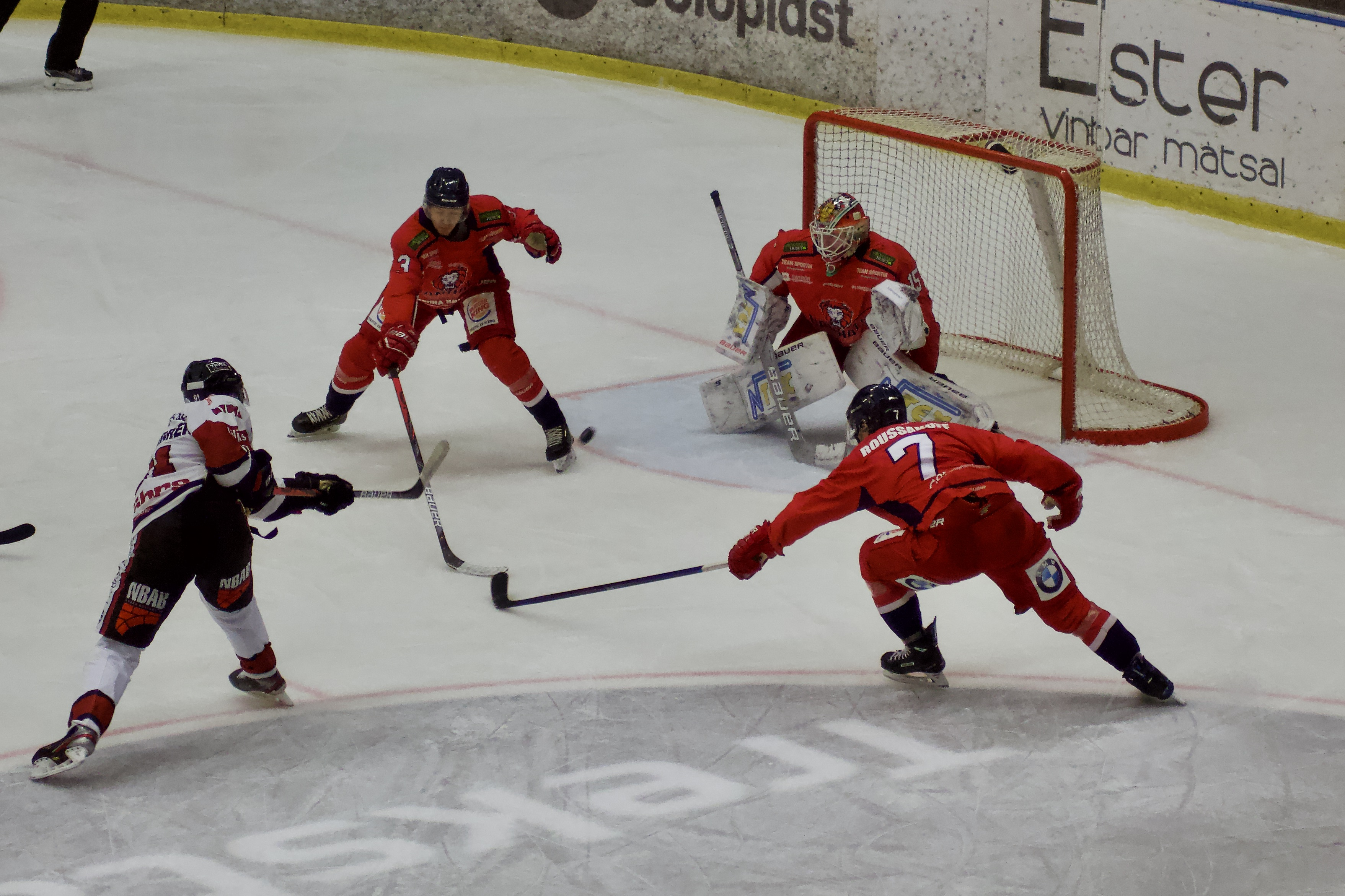 Matchinfo